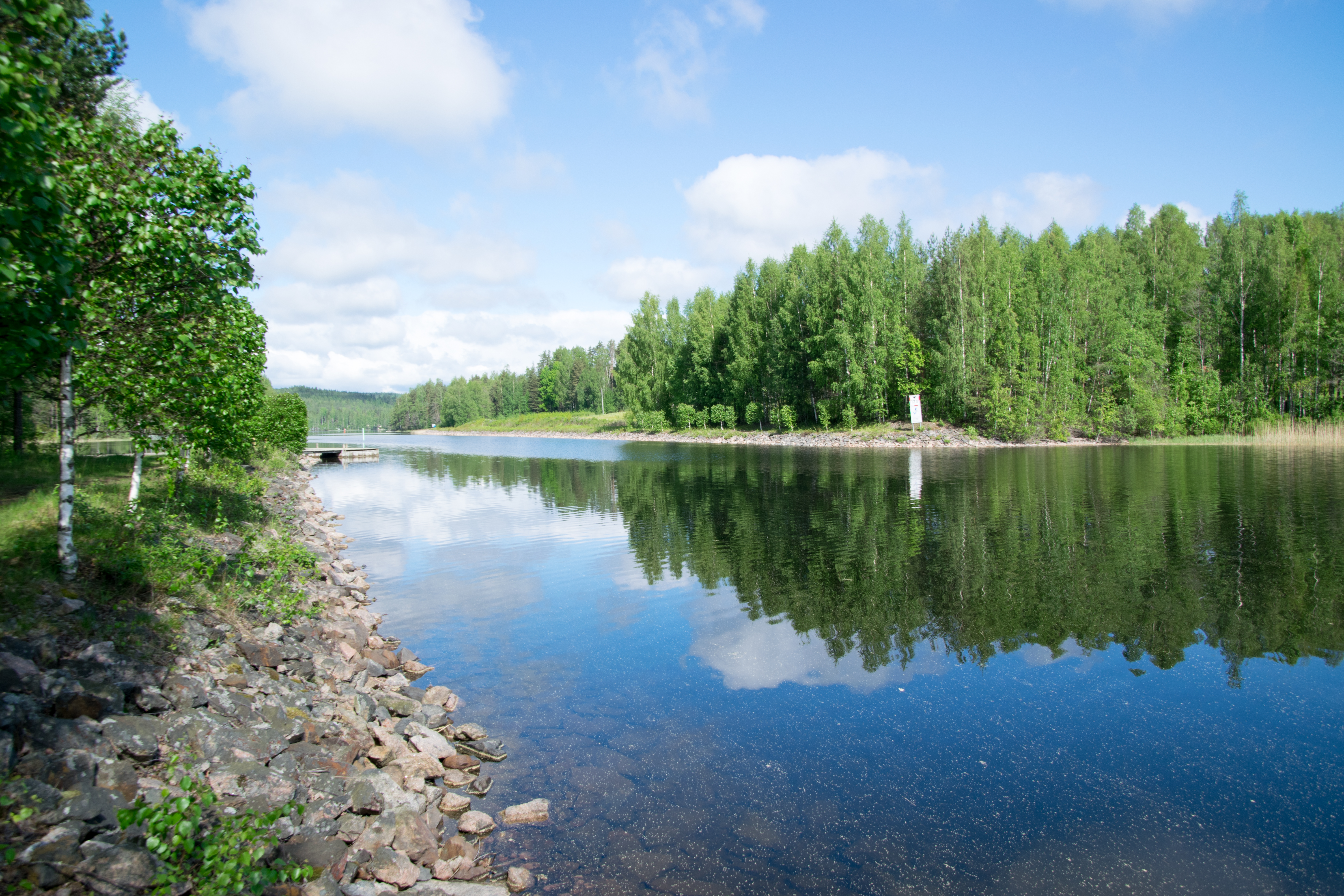 Väätämönsalmen kanava